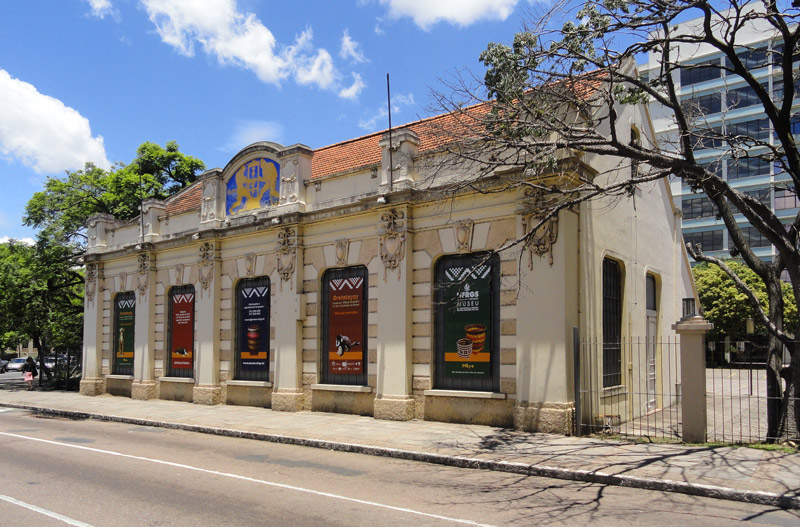 Museu da UFRGS, um prédio histórico da Universidade Federal do Rio Grande do Sul, Porto Alegre, Brasil.